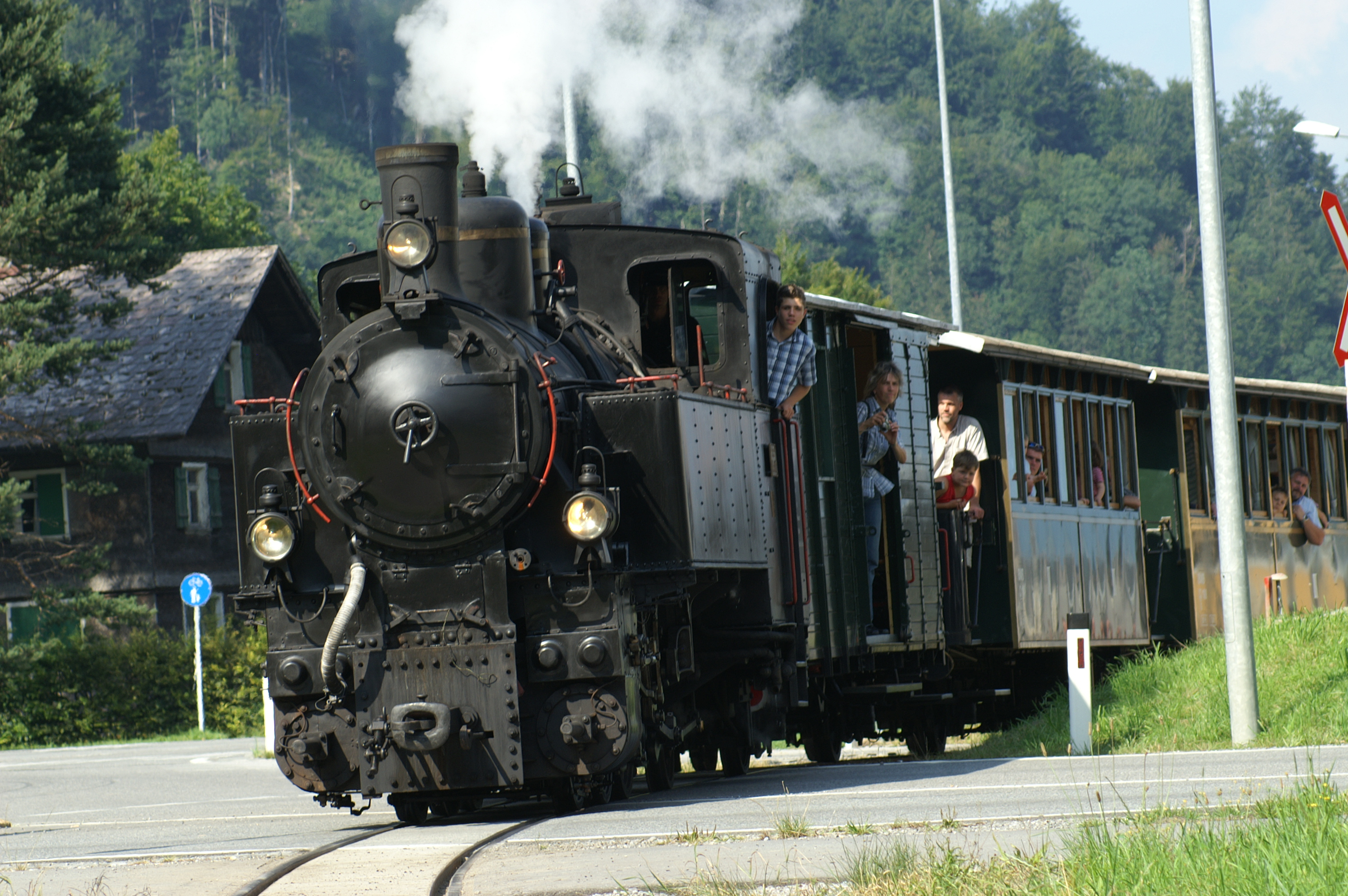 Schwarzenberg Bahnhof mit Museumsbahn "Wälderbähnle".